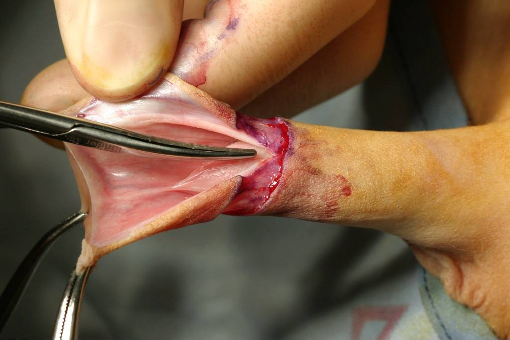 Rituelle Beschneidung eines Kindes durch einen muslimischen Arzt in einem deutschen Universitätsklinikum. Es bestand keine Vorhautverengung.